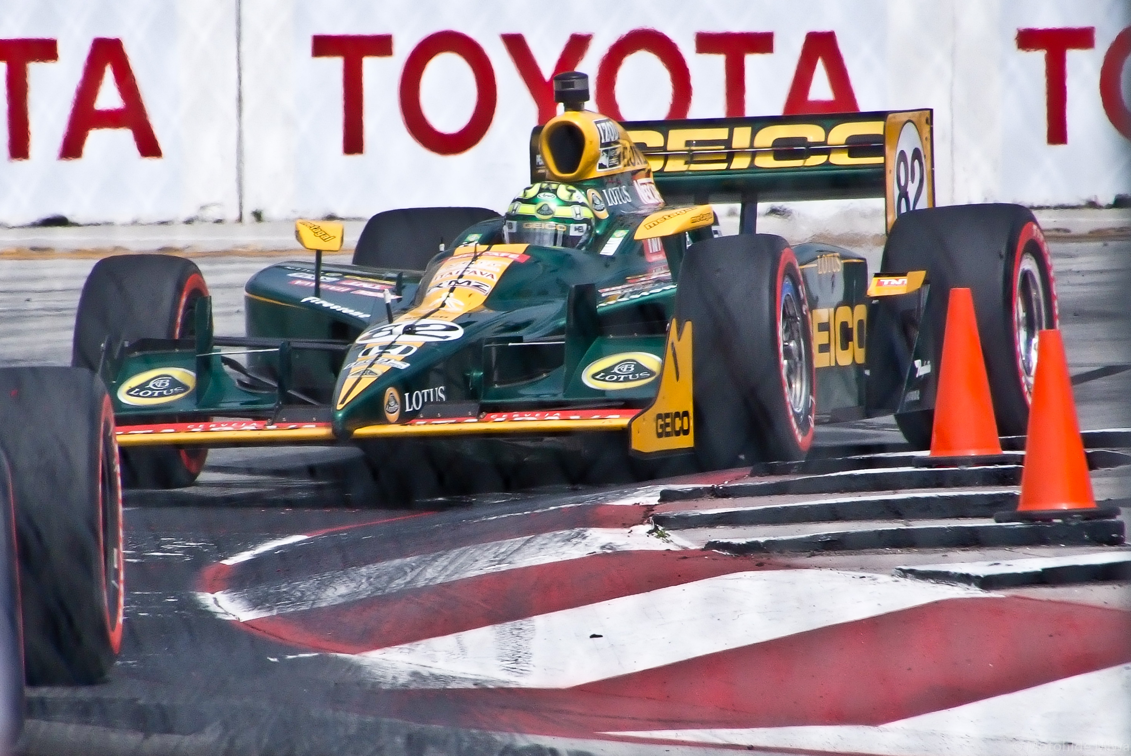 Tony Kanaan - KV Racing Lotus